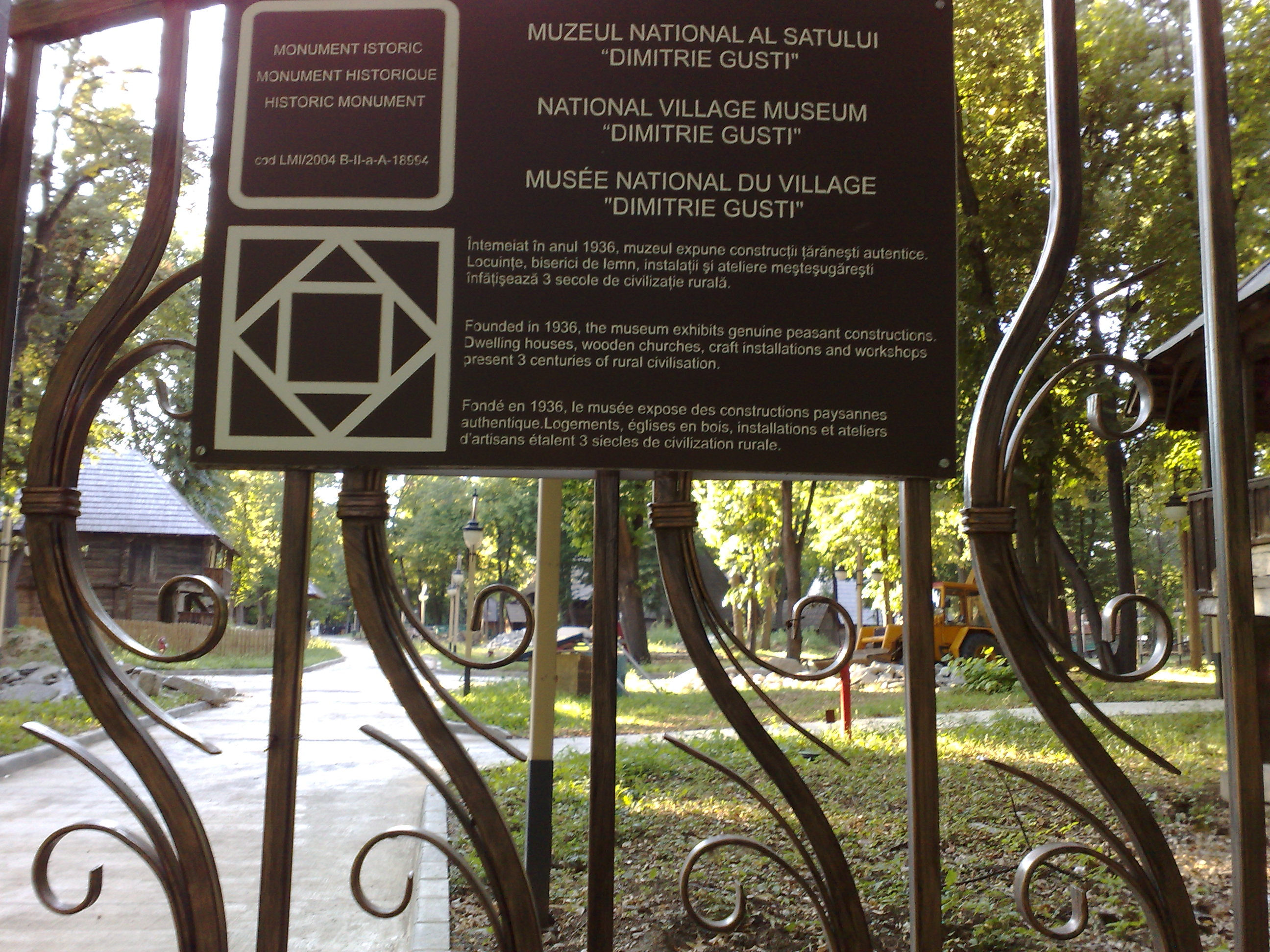 Ansamblul Muzeul Național al Satului „Dimitrie Gusti“